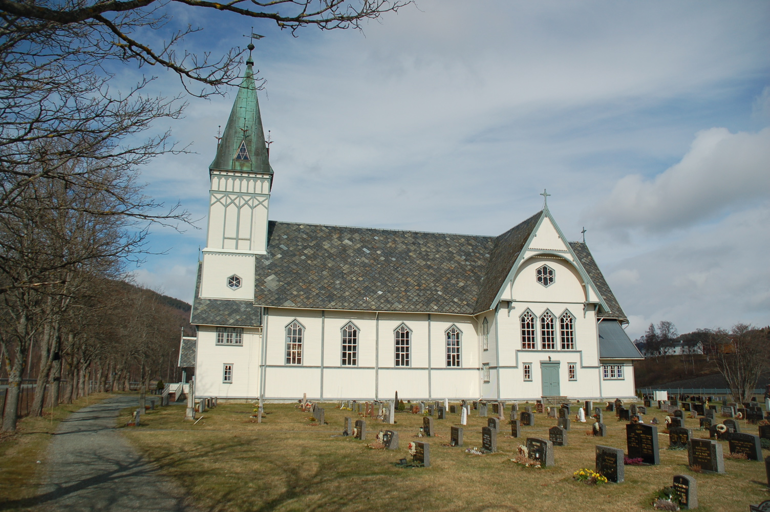 Horg Kirke, Melhus, Sør-Trøndelag, Norge